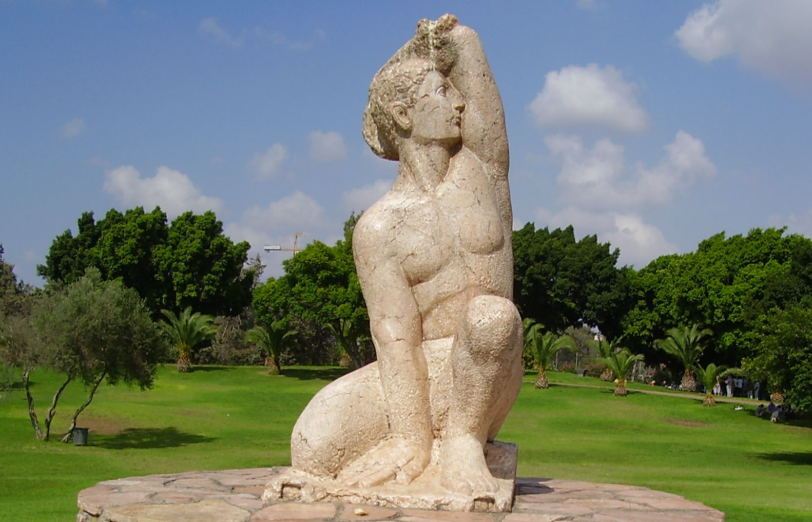 Sculpture